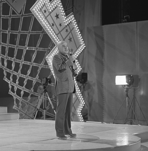 Telly Savalas zingt Lovin' understanding man in het Nederlandse televisieprogramma Showbizzquiz in 1981